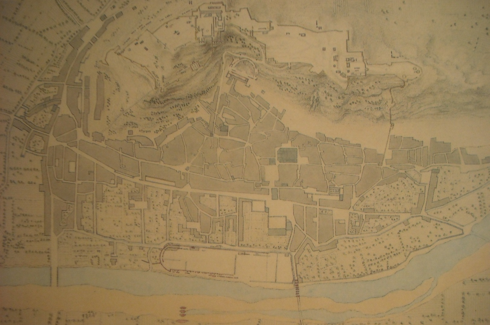 Plànol de Sagunt en 1809, publicat a l'"Itinéraire descriptif de l'Espagne".